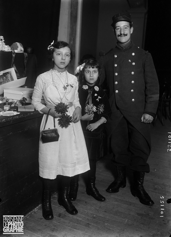 Guerre 1914-1918. Jeune fille (Denise Cartier) tenant un comptoir de vente de charité, 1914.